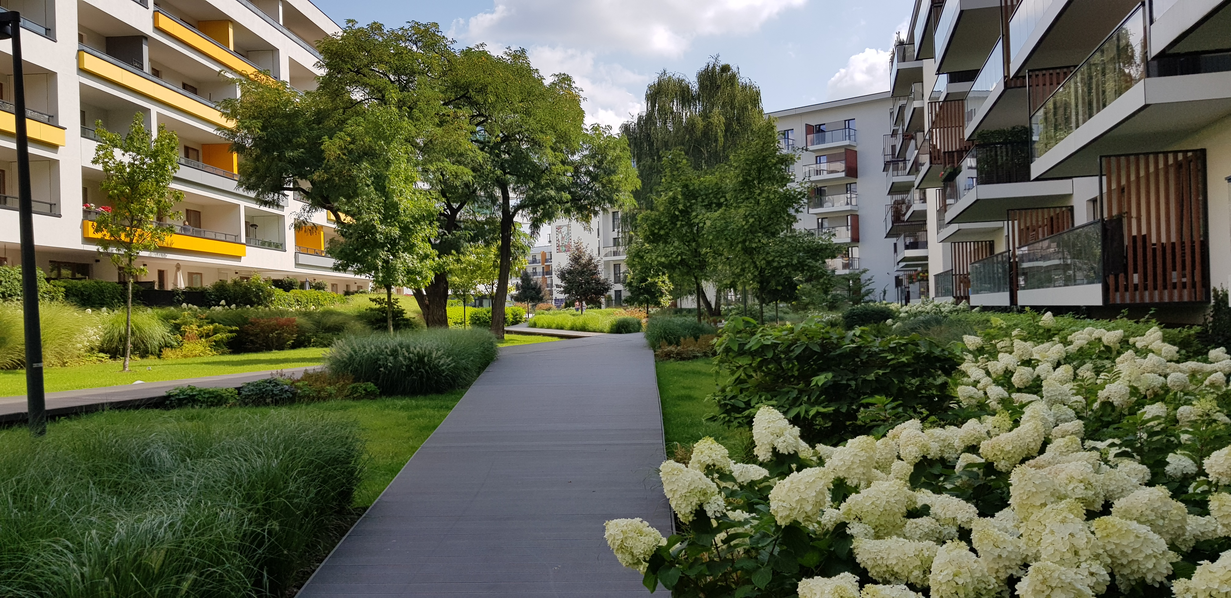 Osiedle mieszkaniowe Żoliborz Artystyczny, Warszawa